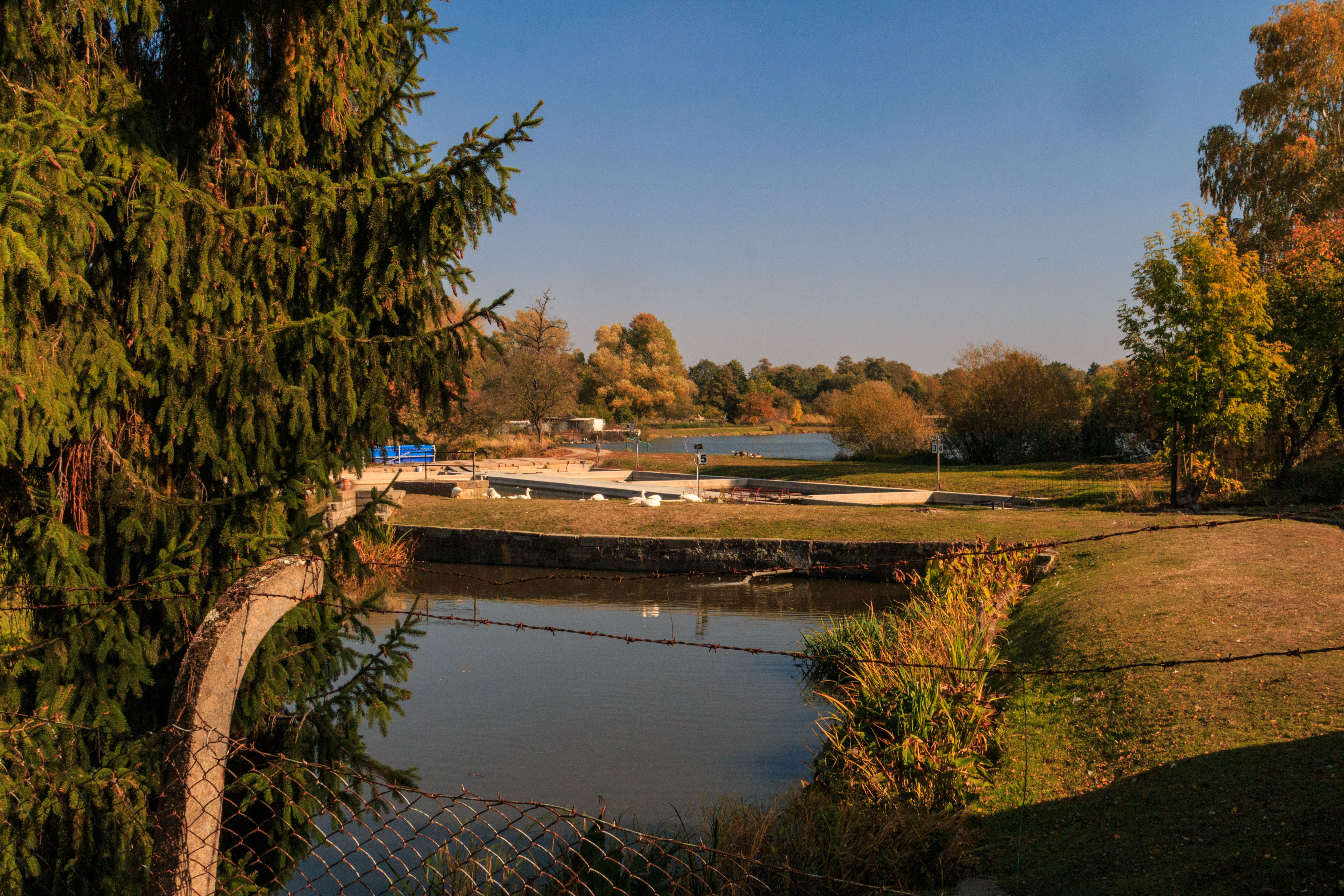 rybníky Pastviště u Malšovic Project: Vodstvo.